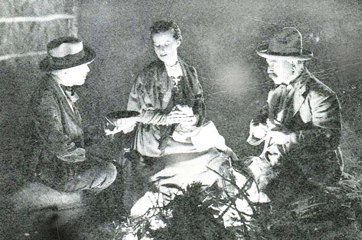 Terra di nessuno - foto scena (Baffico, 1939)